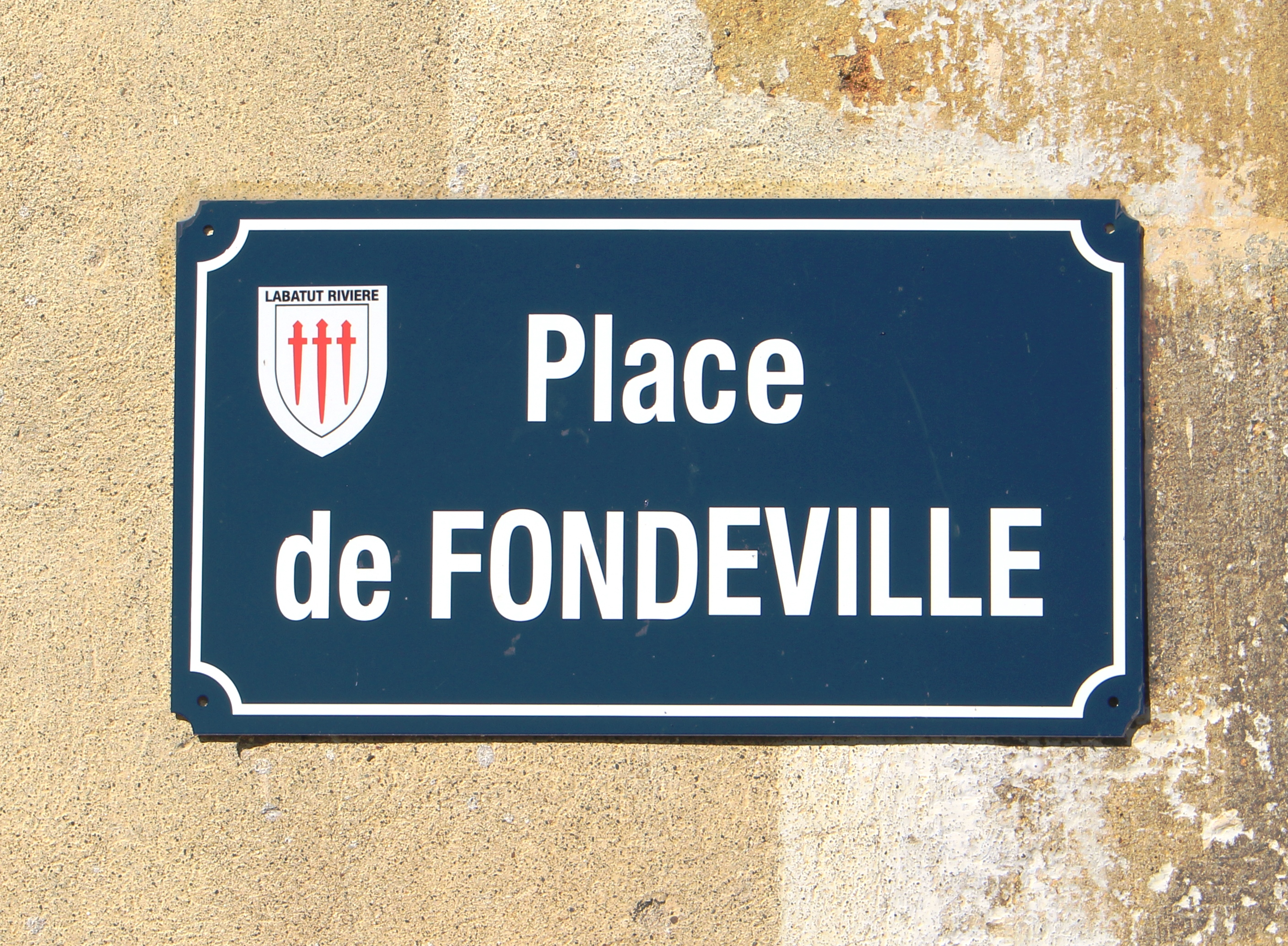 Rue du village de Labatut-Rivière (Hautes-Pyrénées)